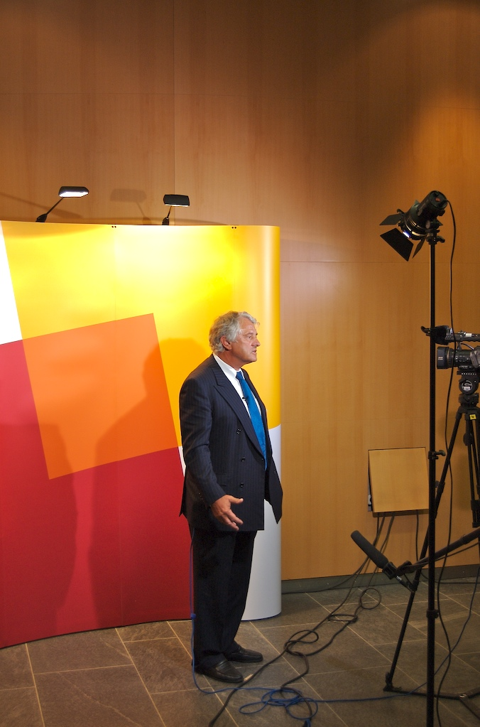 Hasso Plattner im HPI in Potsdam während des IT-Gipfels.